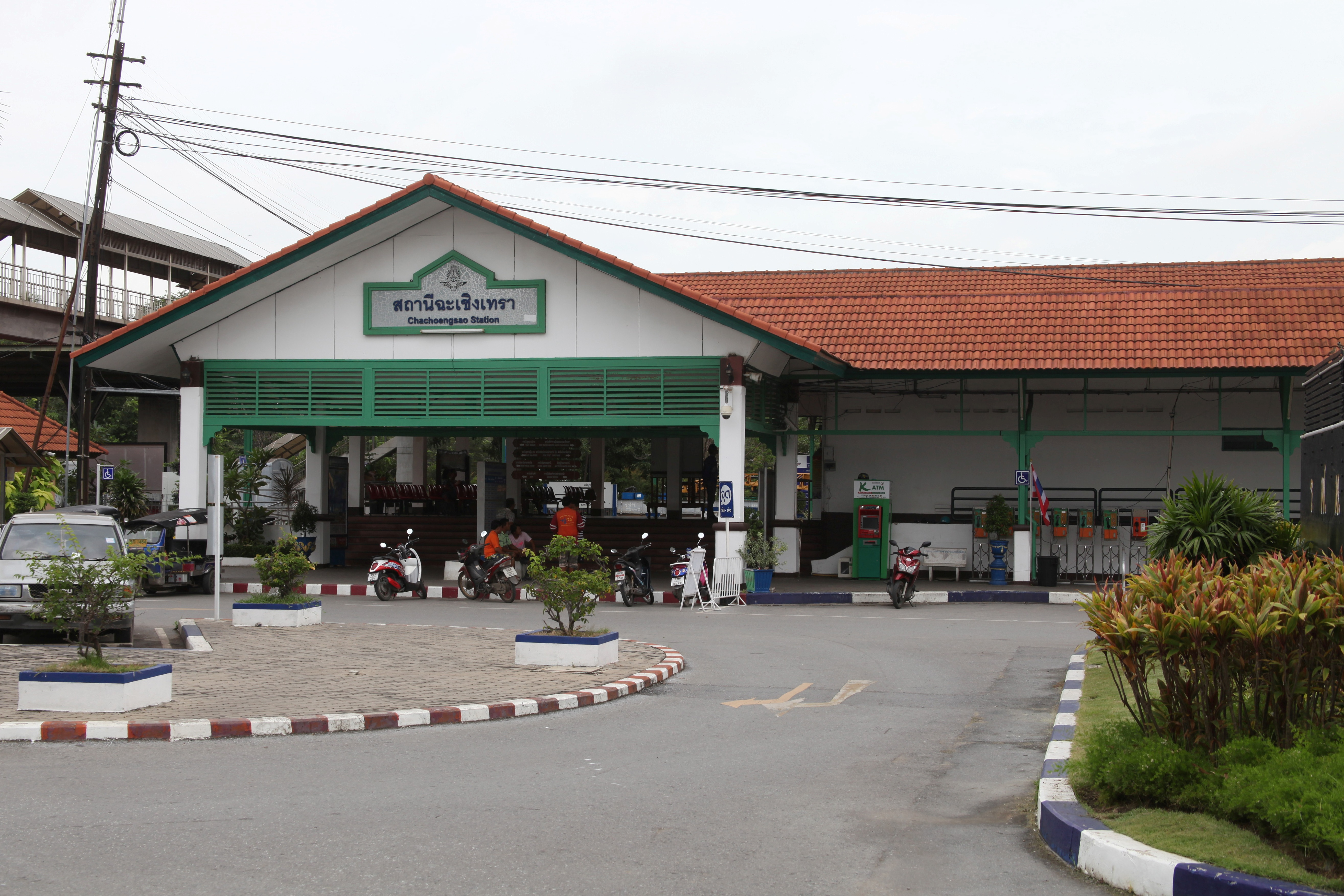 チャチューンサオ駅